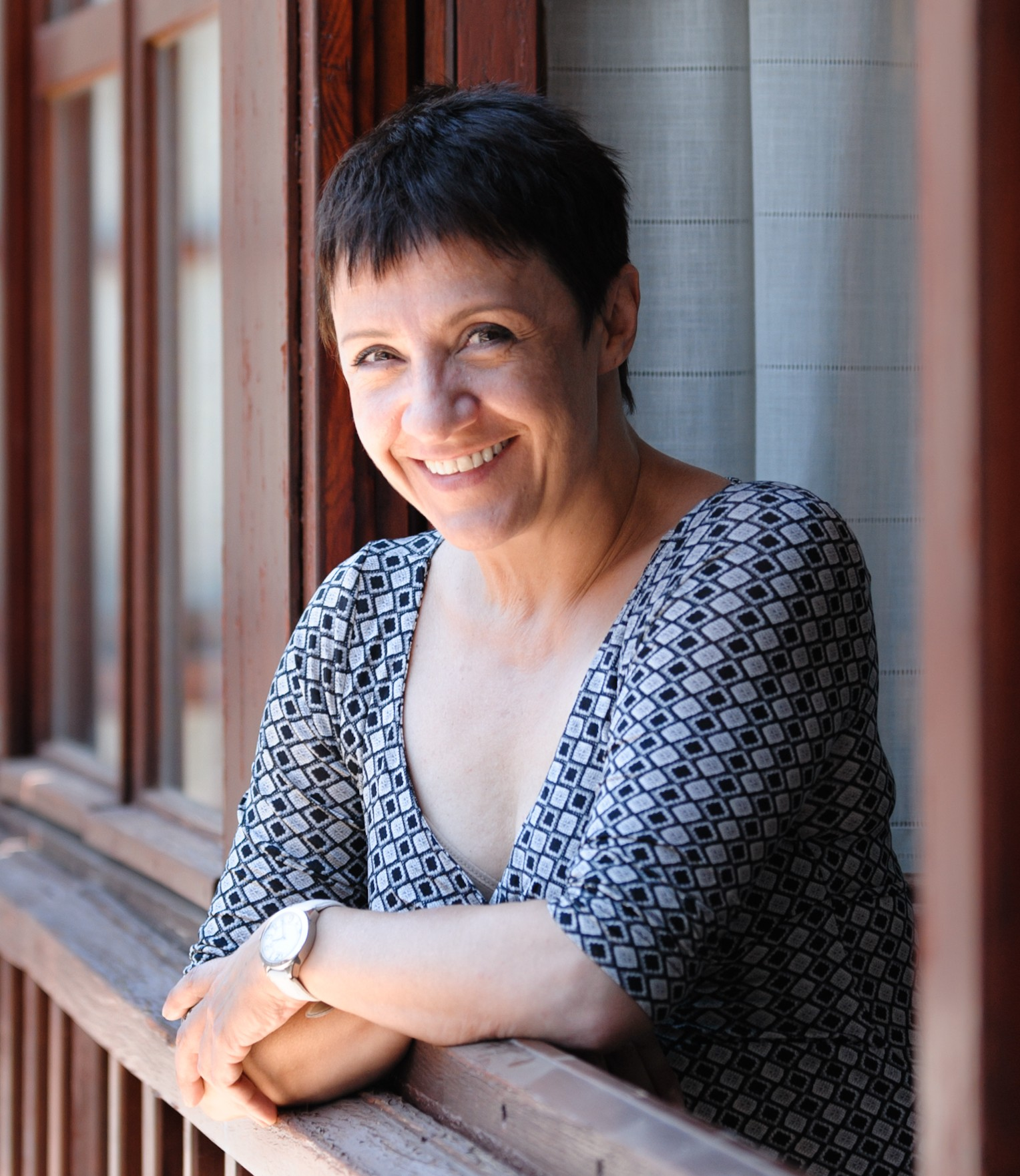 Blanca Portillo antes de la rueda de prensa de presentación de La vida es sueño Festival Internacional de Teatro Clásico de Almagro. Foto: Guillermo Casas